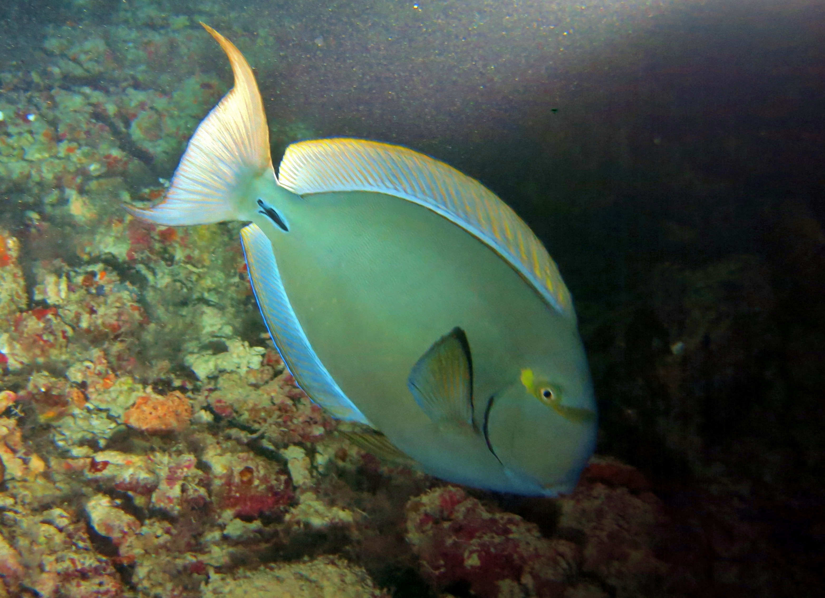 Un poisson-chirurgien à nageoires jaunes (Acanthurus xanthopterus) aux Maldives (atoll de Baa).